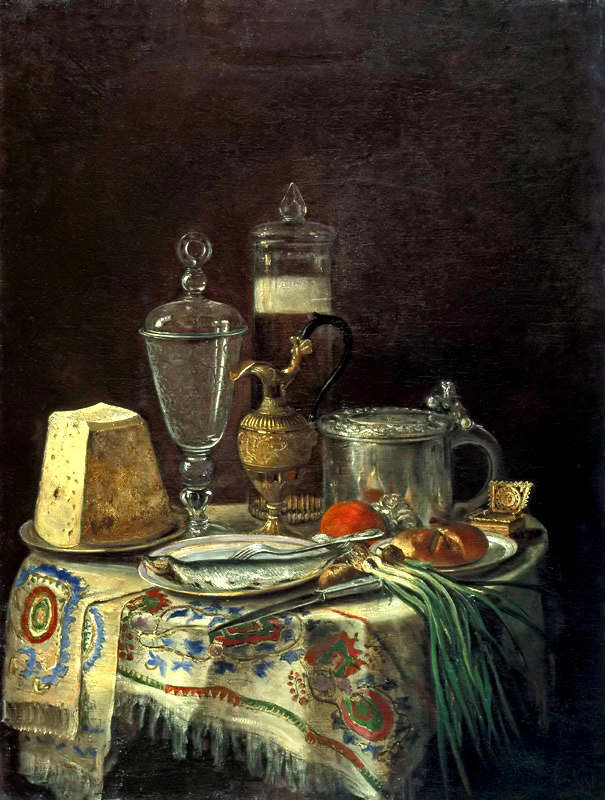 Великая княгиня Мария Федоровна Натюрморт. 1868 Слева внизу: М и 68 (буквы переплетены) Великая княгиня Мария Федоровна. Натюрморт. 1868. Холст, масло. 24 23. Слева внизу: М и 68 (буквы переплетены). Музей изобразительных искусств Республики Карелия г. Петрозаводск Ж-58